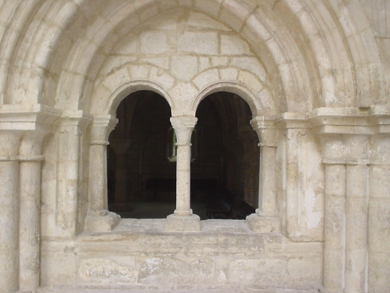 Kloster La Santa Espina, Zwillingsfenster des Kapitelsaals